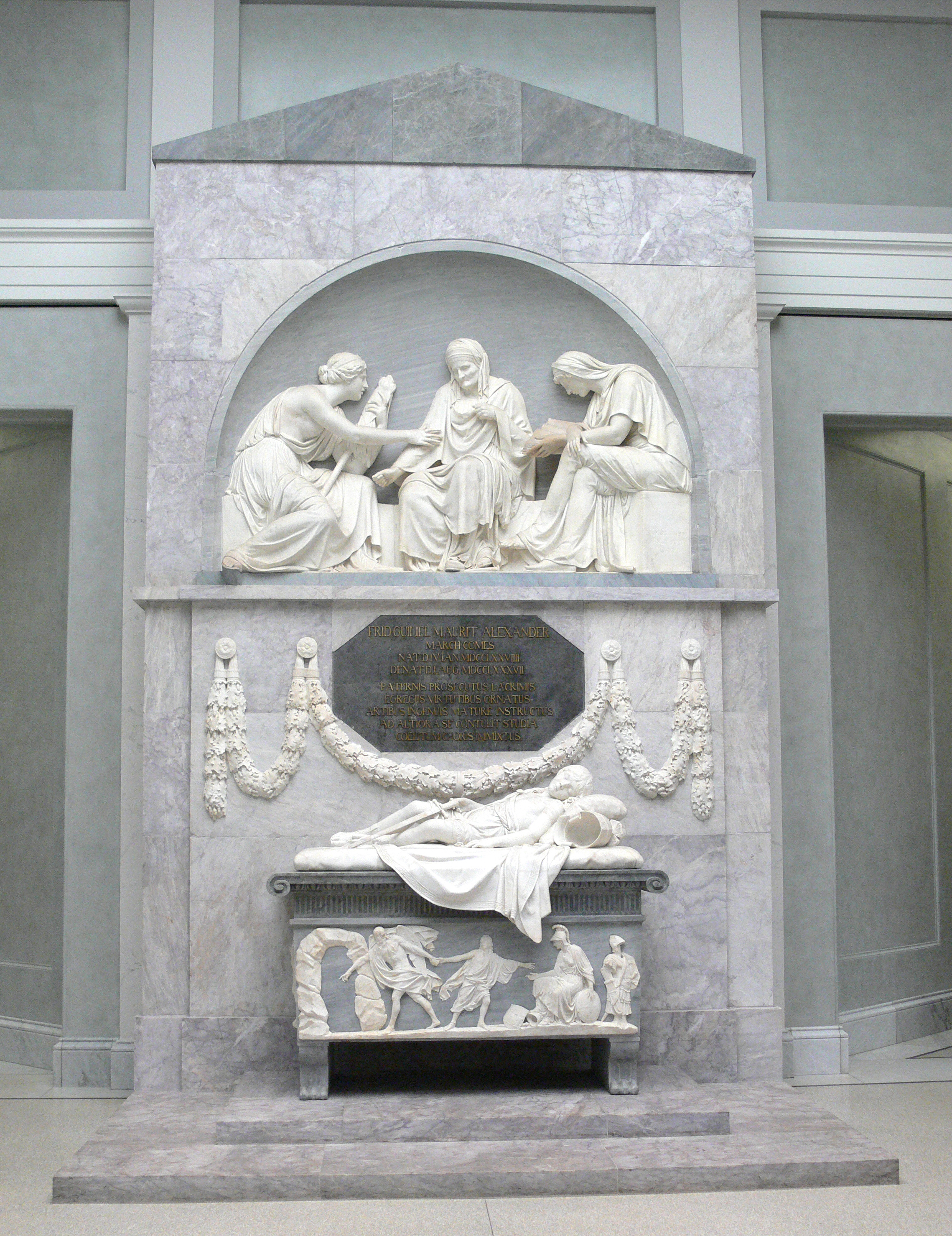 Grabmal des Prinzen Alexander von der Mark; Alte Nationalgalerie Berlin (Leihgabe der evangelischen Kirchengemeinde Friedrichswerder zu Berlin)